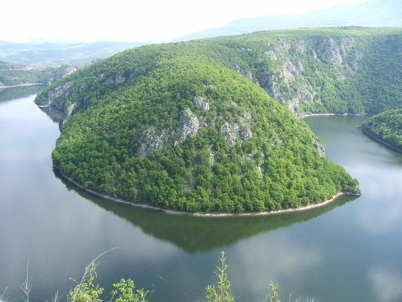 Rijeka Vrbas